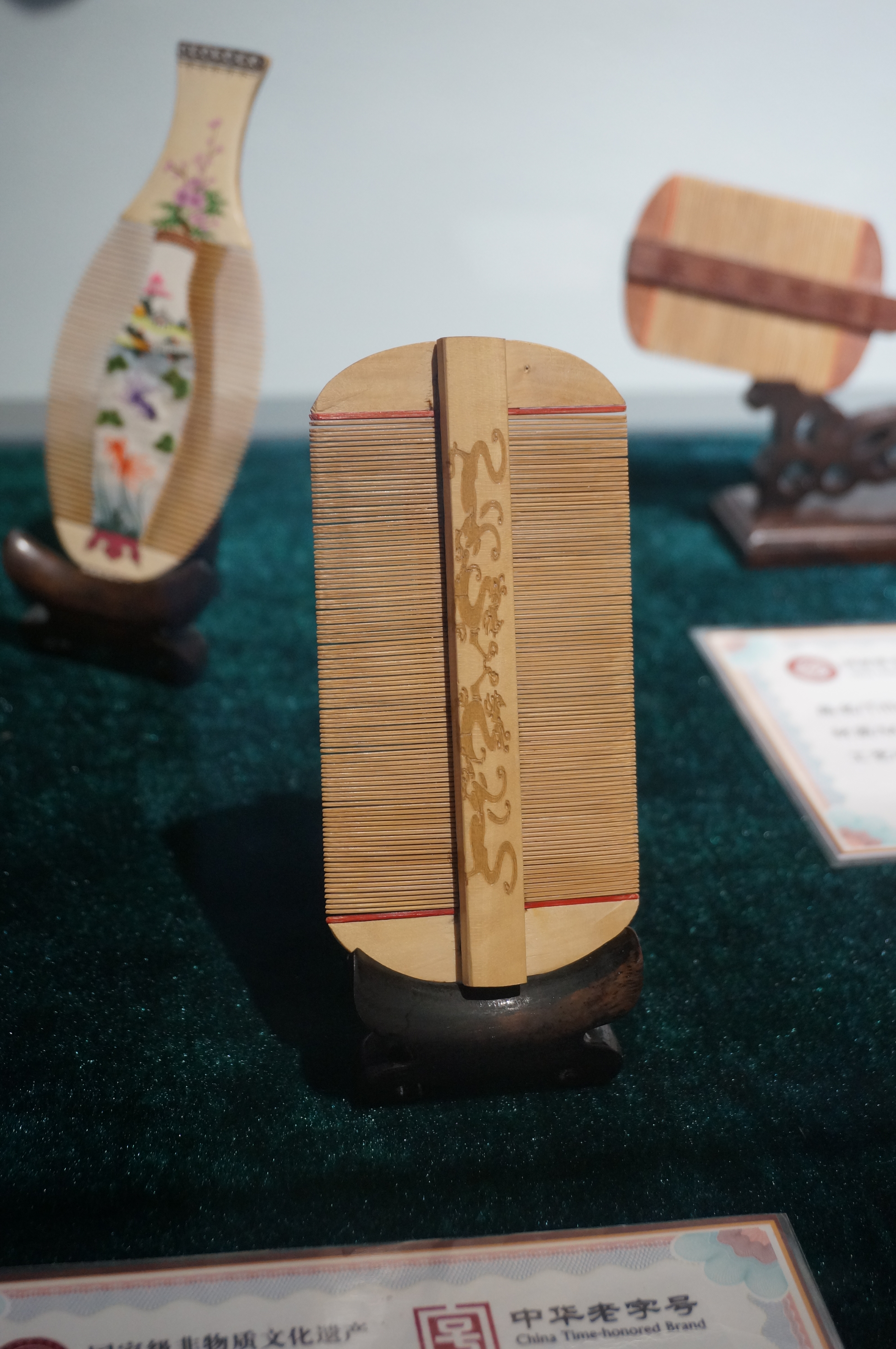 常州梳篦厂所产黄杨篦箕，材质为小叶黄杨、竹子。